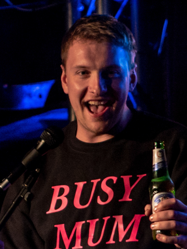 LycettPascoeGreen290518-11